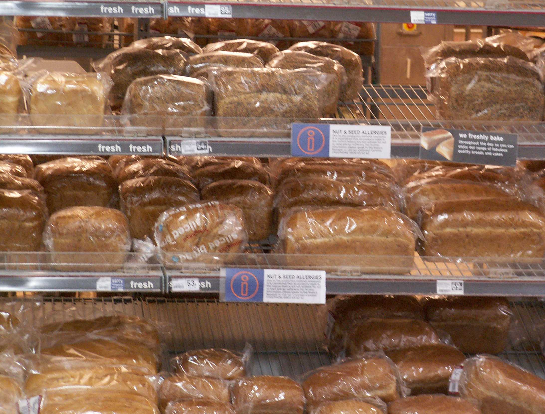 Bread